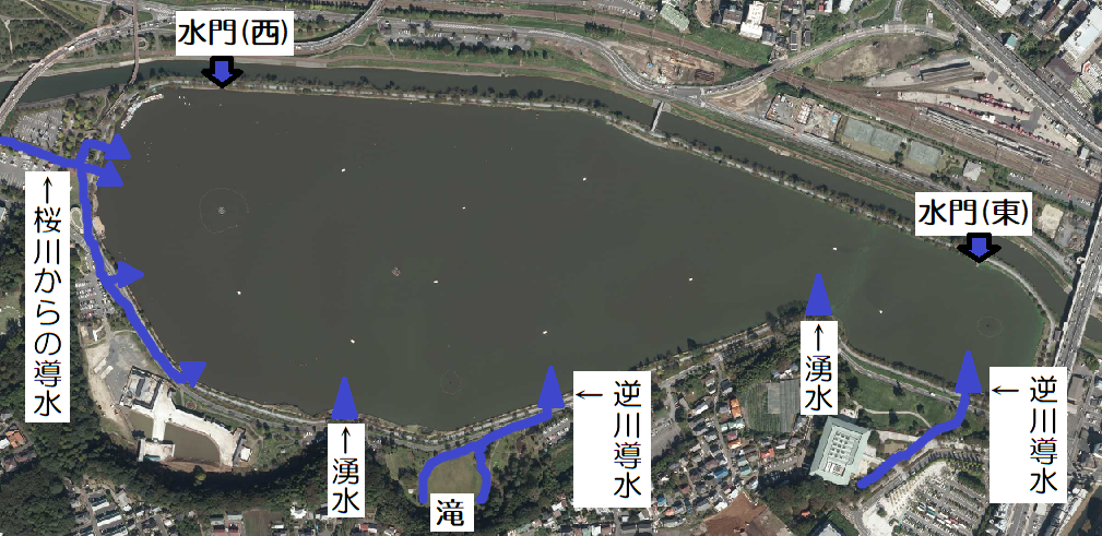 茨城県水戸市にある千波湖での水の流入出状況を示した図。国土地理院の空中写真に、水戸市が示した水流入出状況図[1]を元に投稿者が加筆。